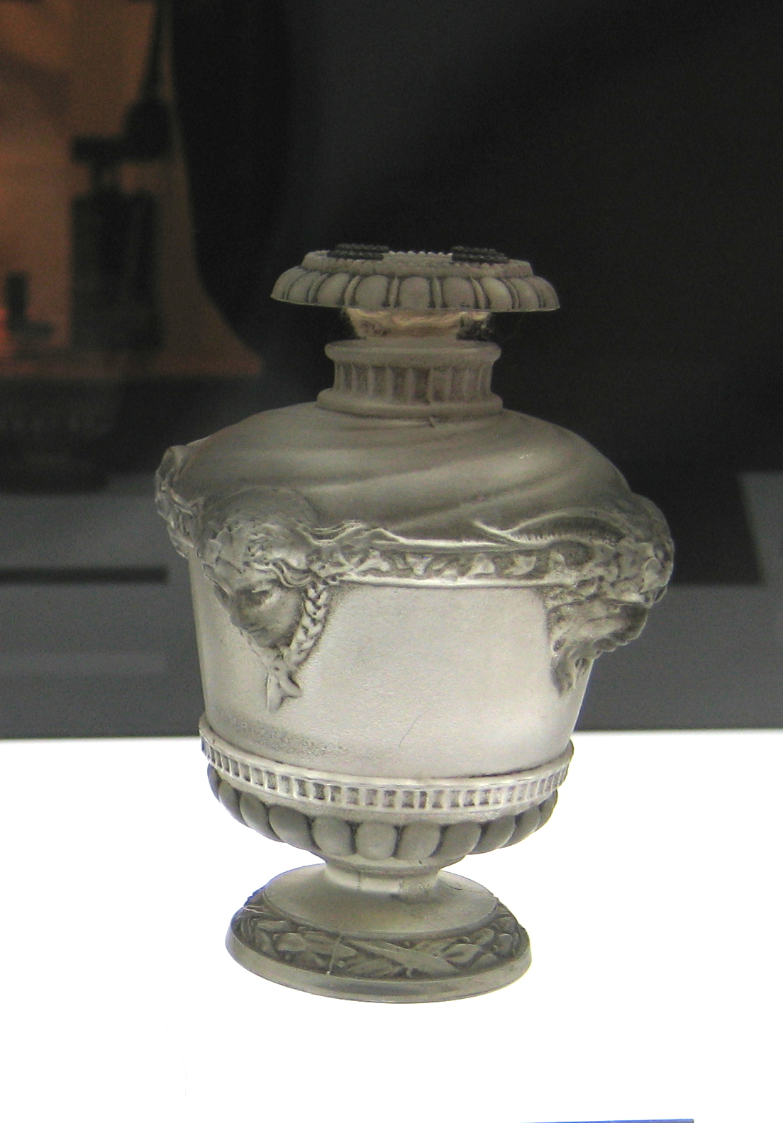 Guerlain, Bouquet de Faunes (1926)